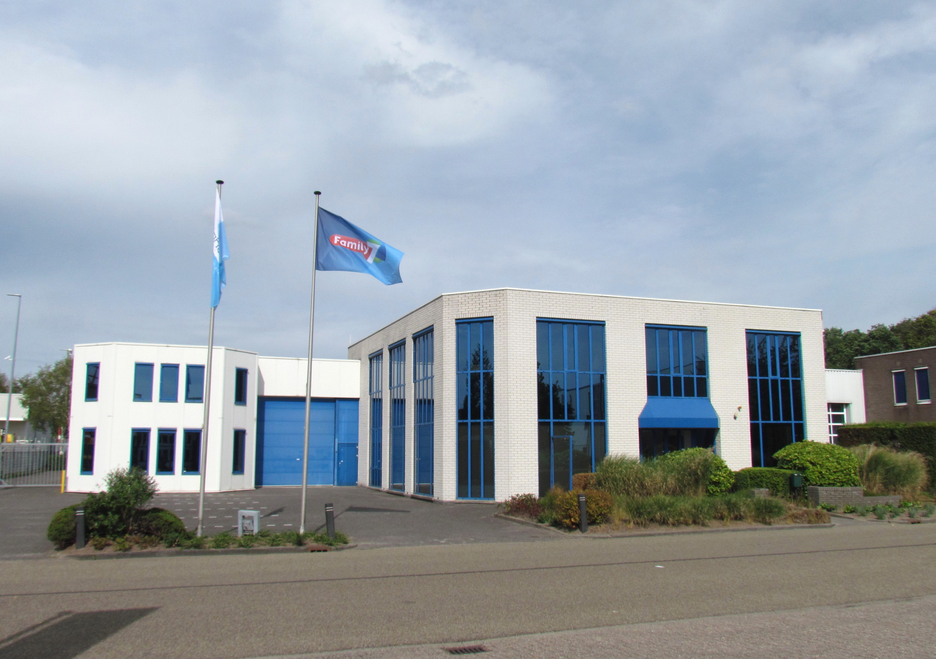 Het pand van de Nederlandse televisiezender Family7 aan de Nagelpoelweg 16-18 in Apeldoorn, geopend in september 2018